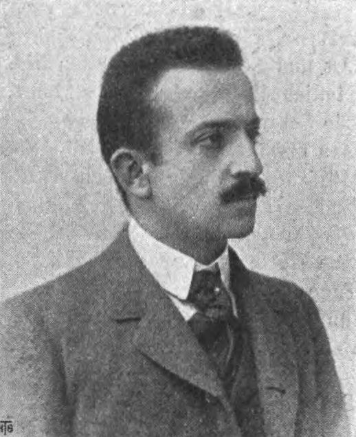 Filippo De Filippi